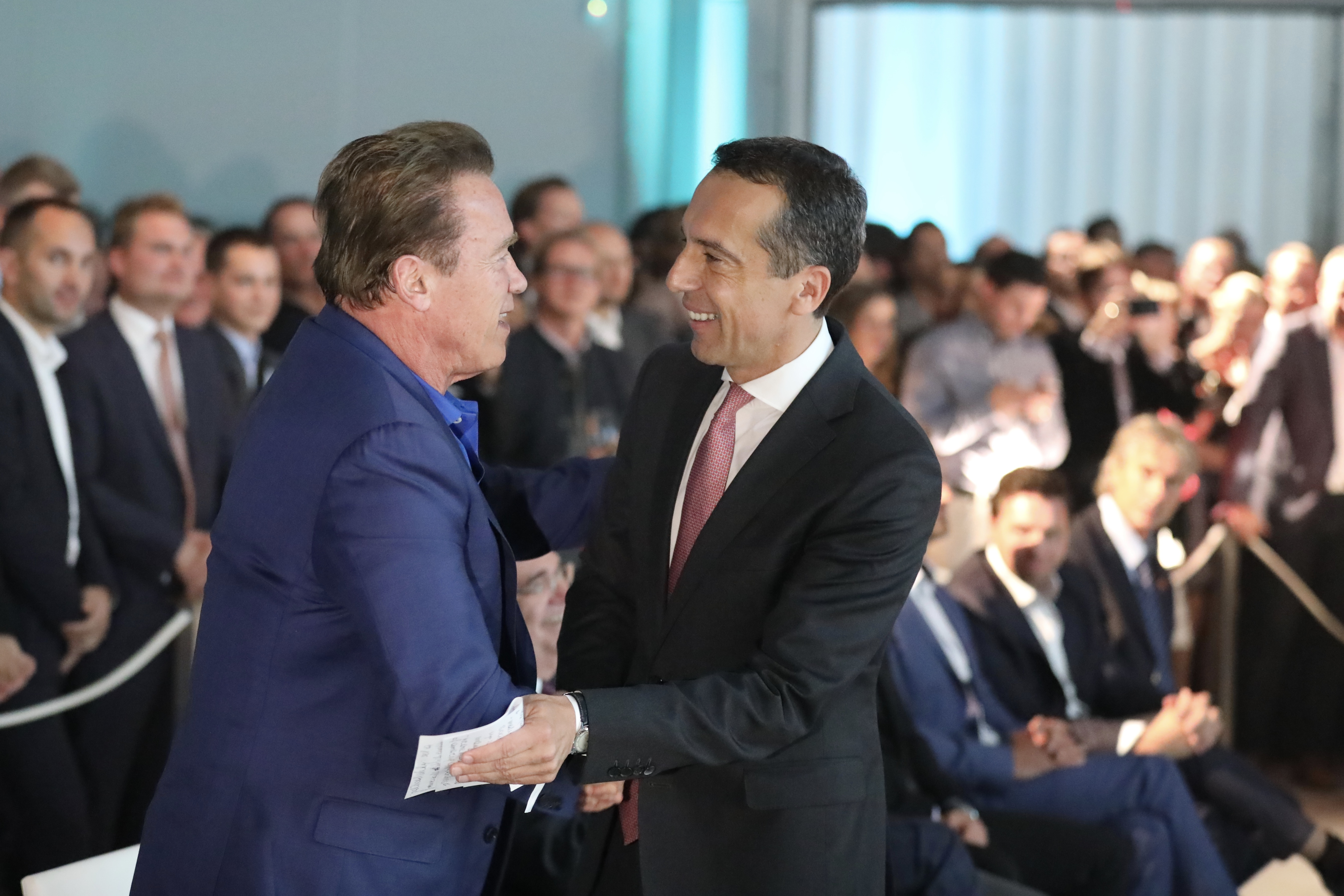 Am 19.9. war Bundeskanzler Christian Kern unterwegs in Oberösterreich. Gemeinsam mit Hollywood-Legende Arnold Schwarzenegger eröffnete Kern die neue Zentrale der Firma Kreisel Electric in Rainbach (Fotos: SPÖ/Zach-Kiesling).